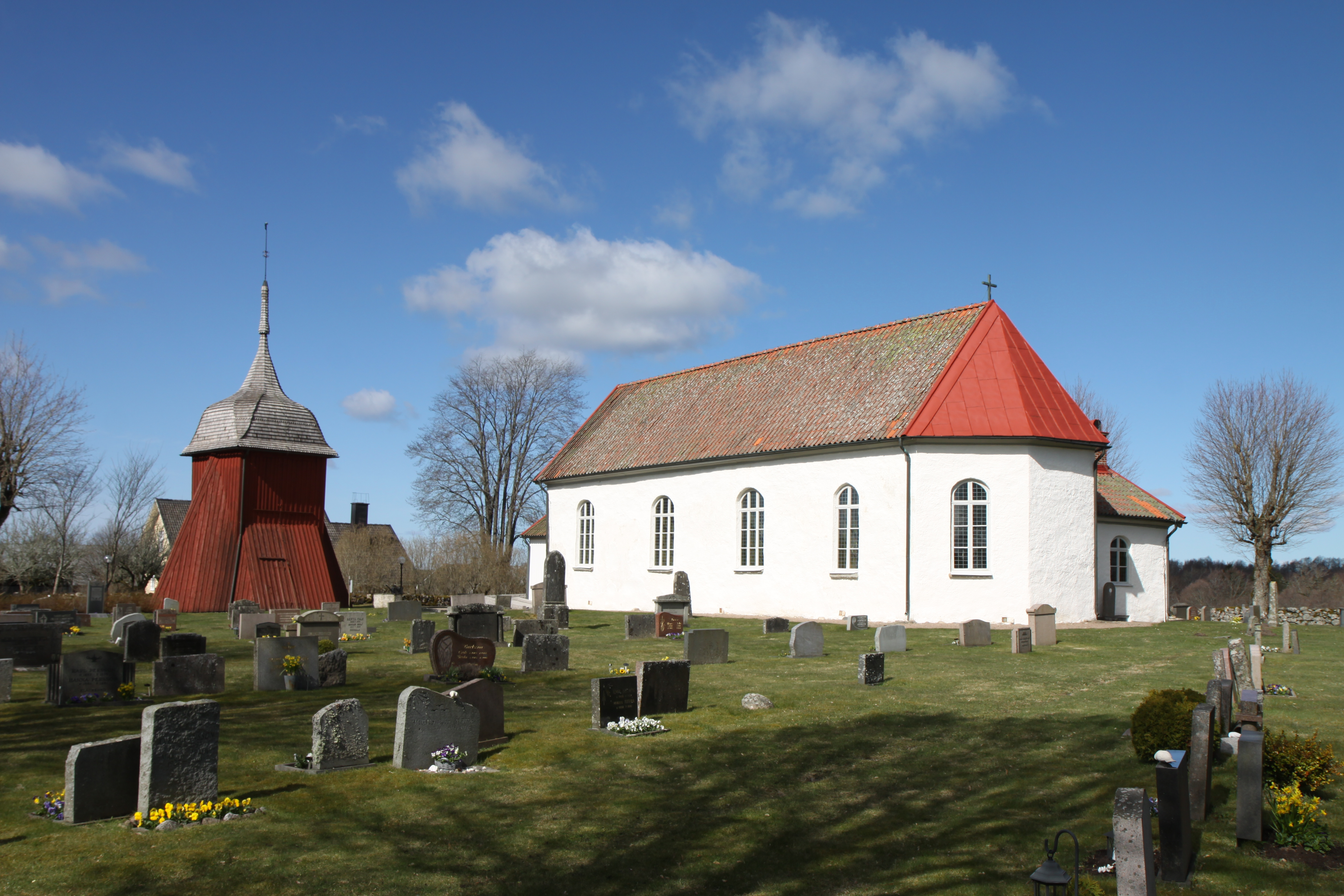 Hovs kyrka.